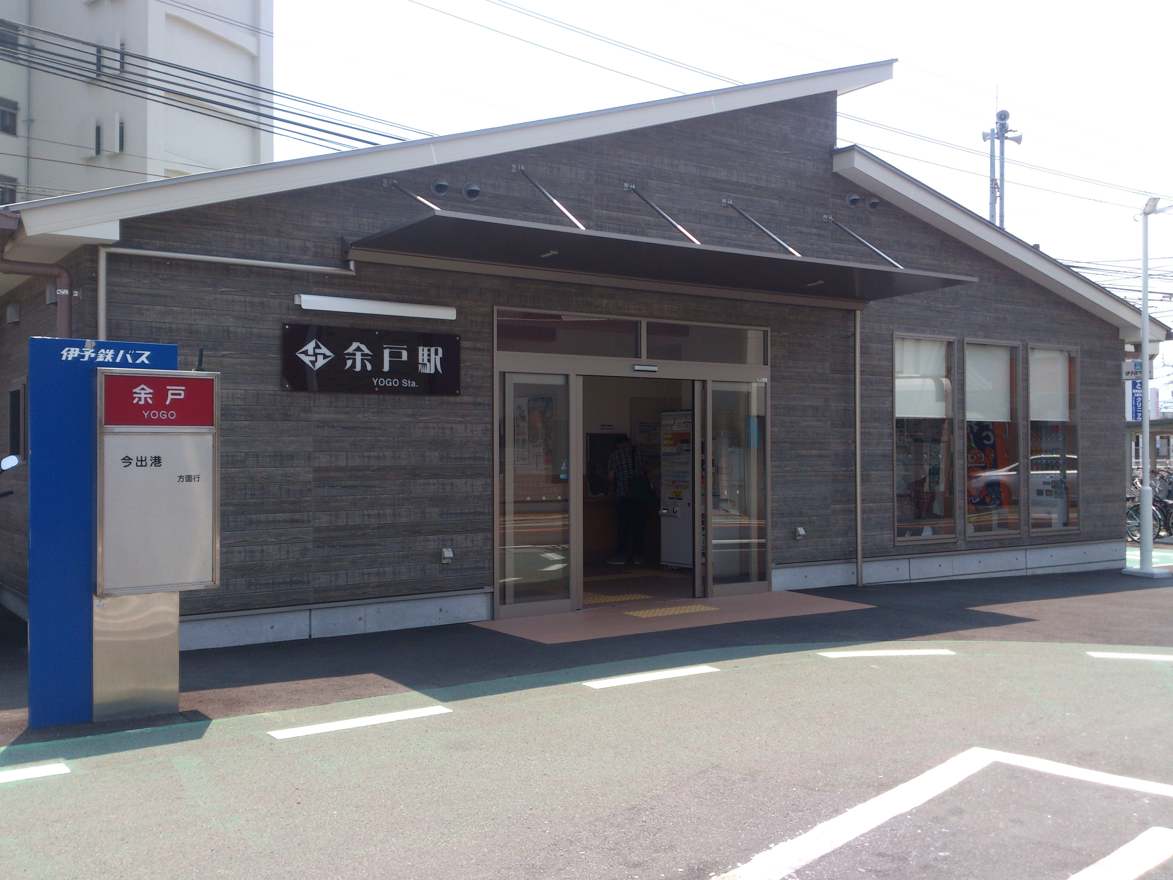 伊予鉄道 余戸駅です。